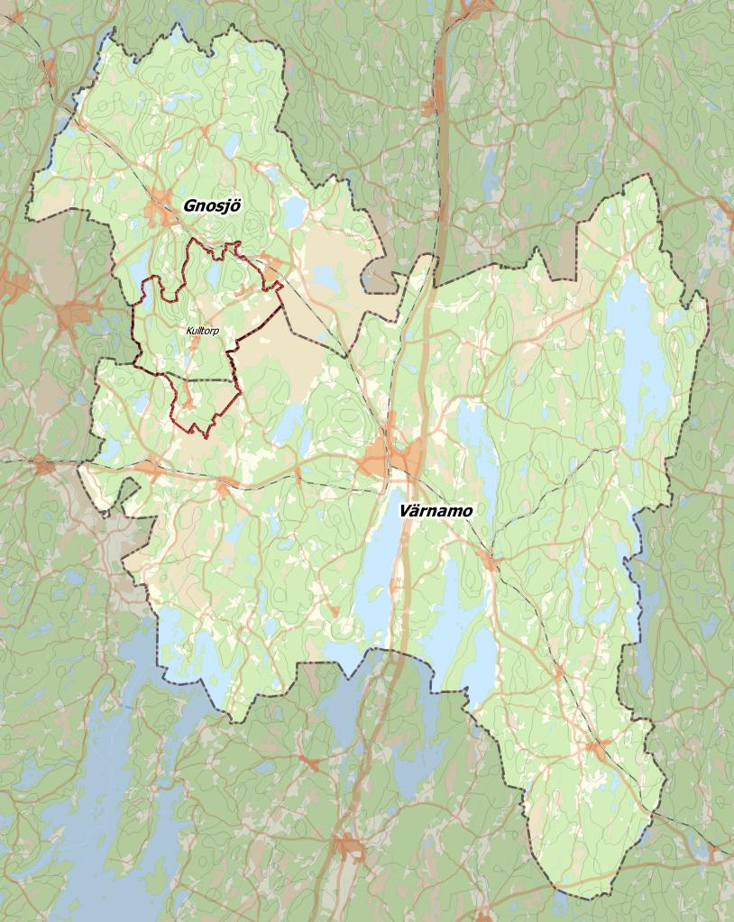 Kulltorps distrikt i Gnosjö och Värnamo kommuner. World file: 69.44261005416490207 0 0 -69.44261005416490207 411907.61039754282683134 6373471.65747501514852047